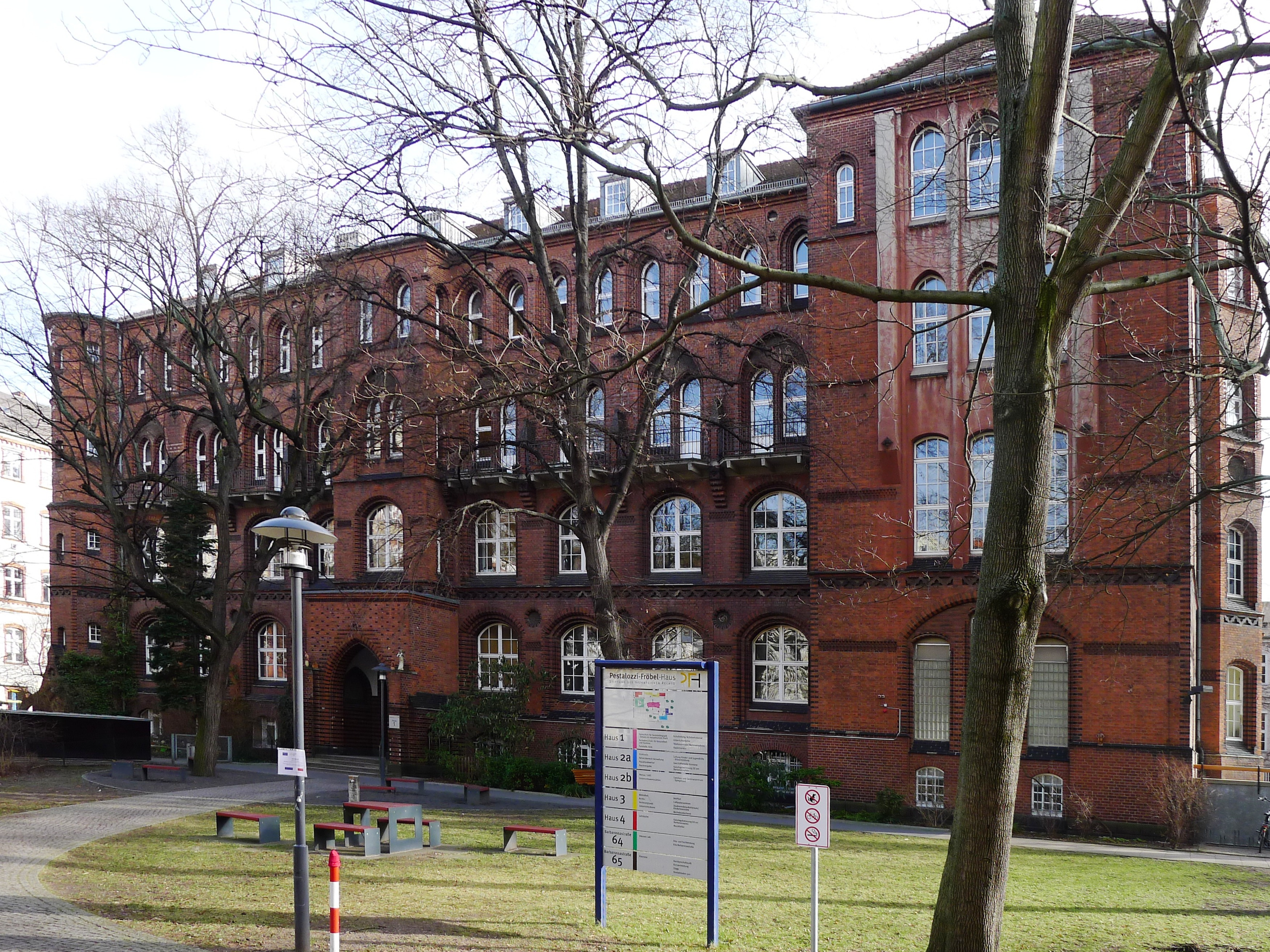 Haus 1 des Pestalozzi-Fröbel-Hauses